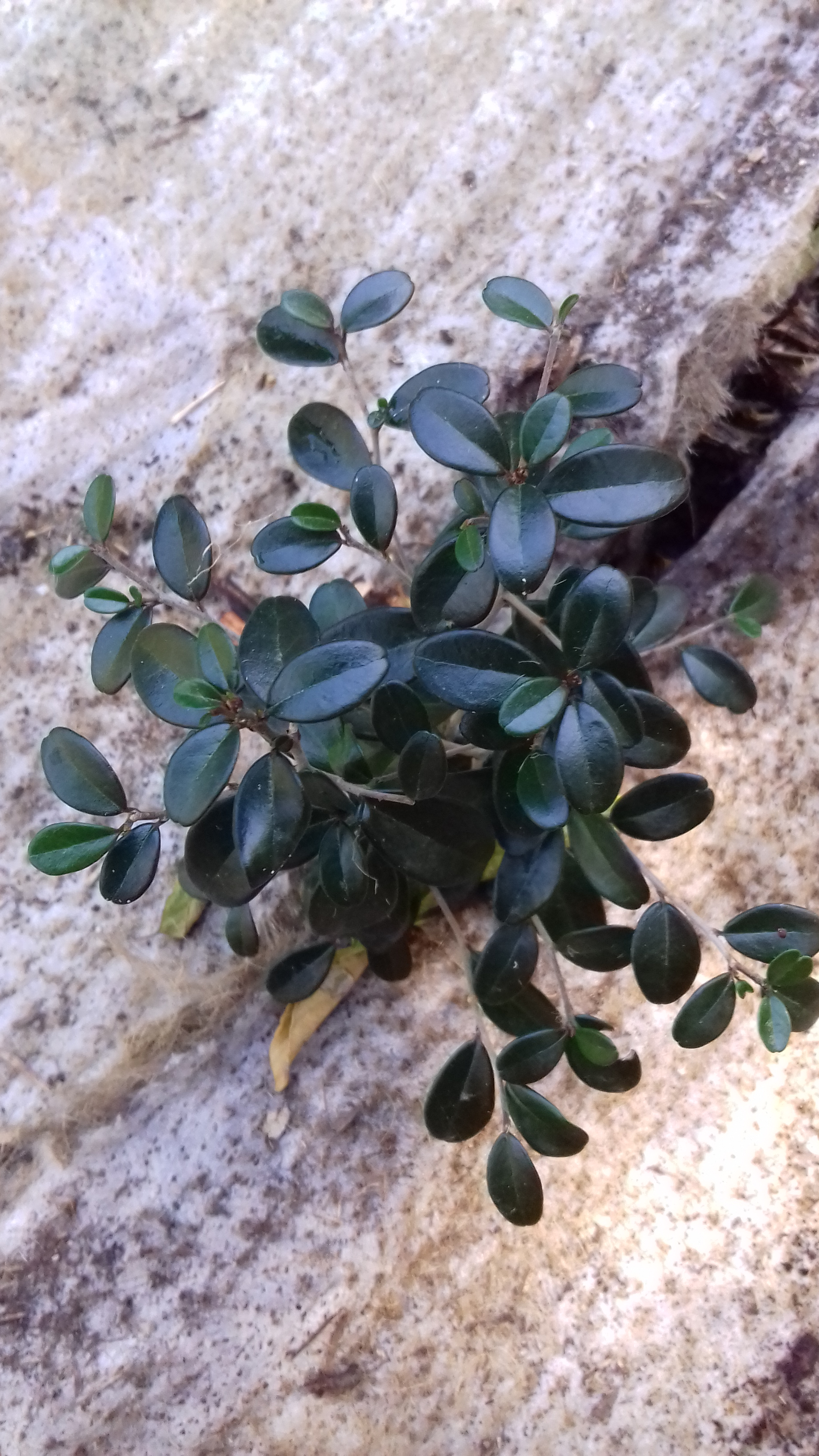 Rejeton d'Emmenospera pancherianum photographié au Ouen Toro, sur une des parcelles de forêt sèche en cours de restauration par une association de défense de l'environnement